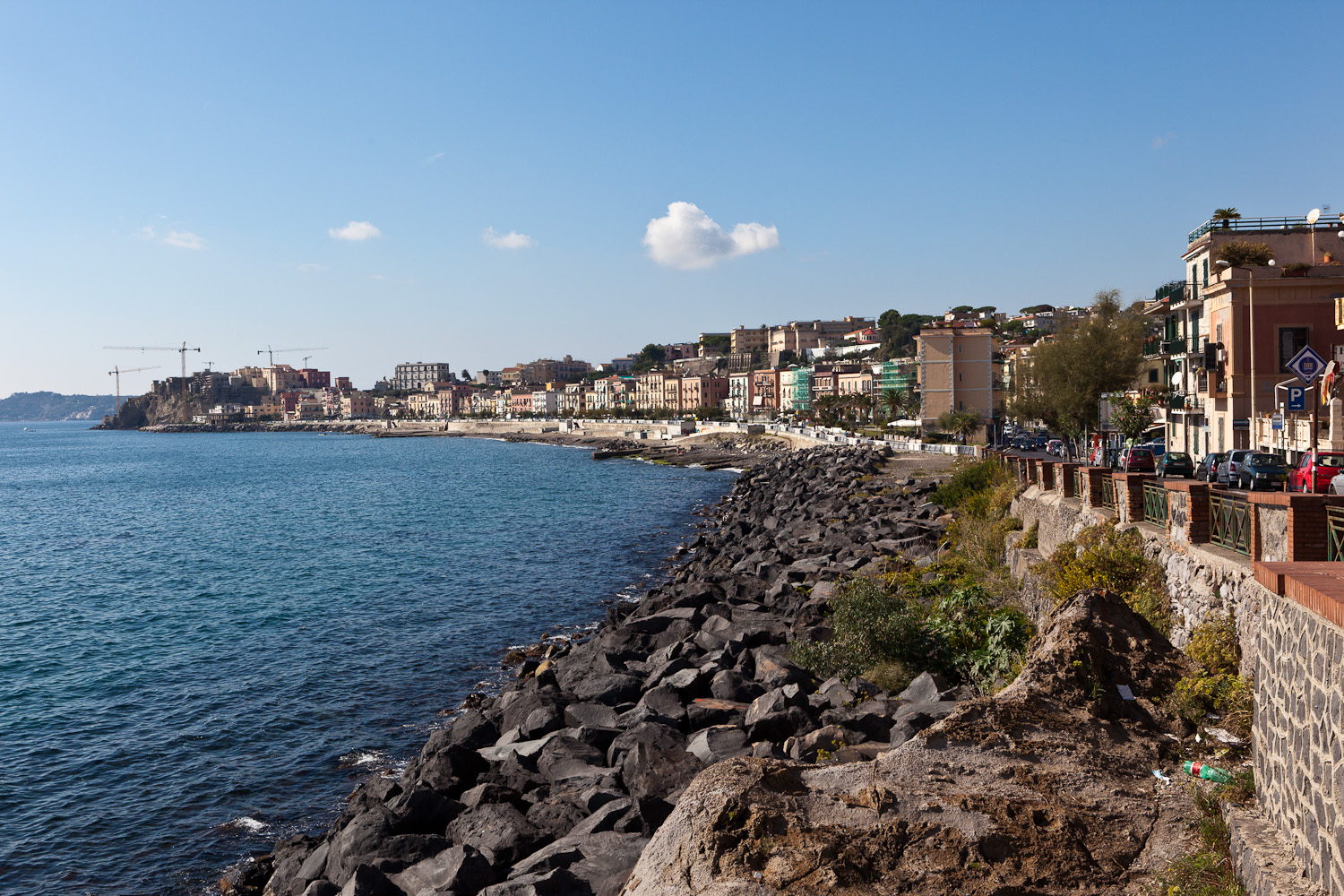 Pozzuoli Boardwalk